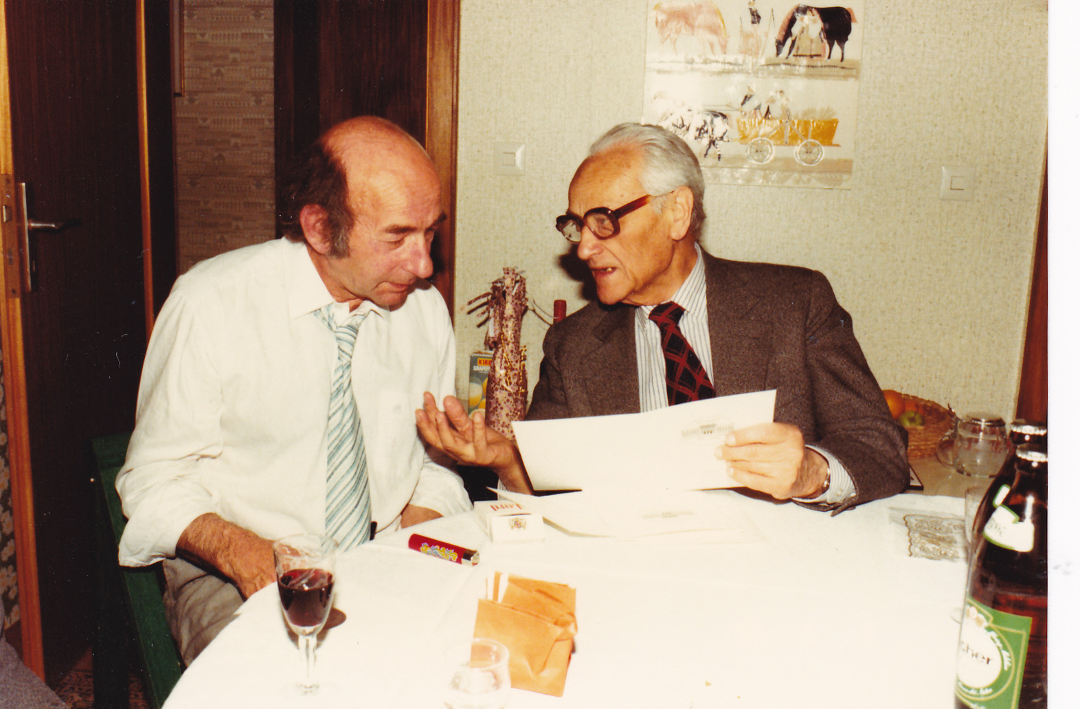 Józef Bogusz, lekarz, i Erich Dauzenroth (po lewej)